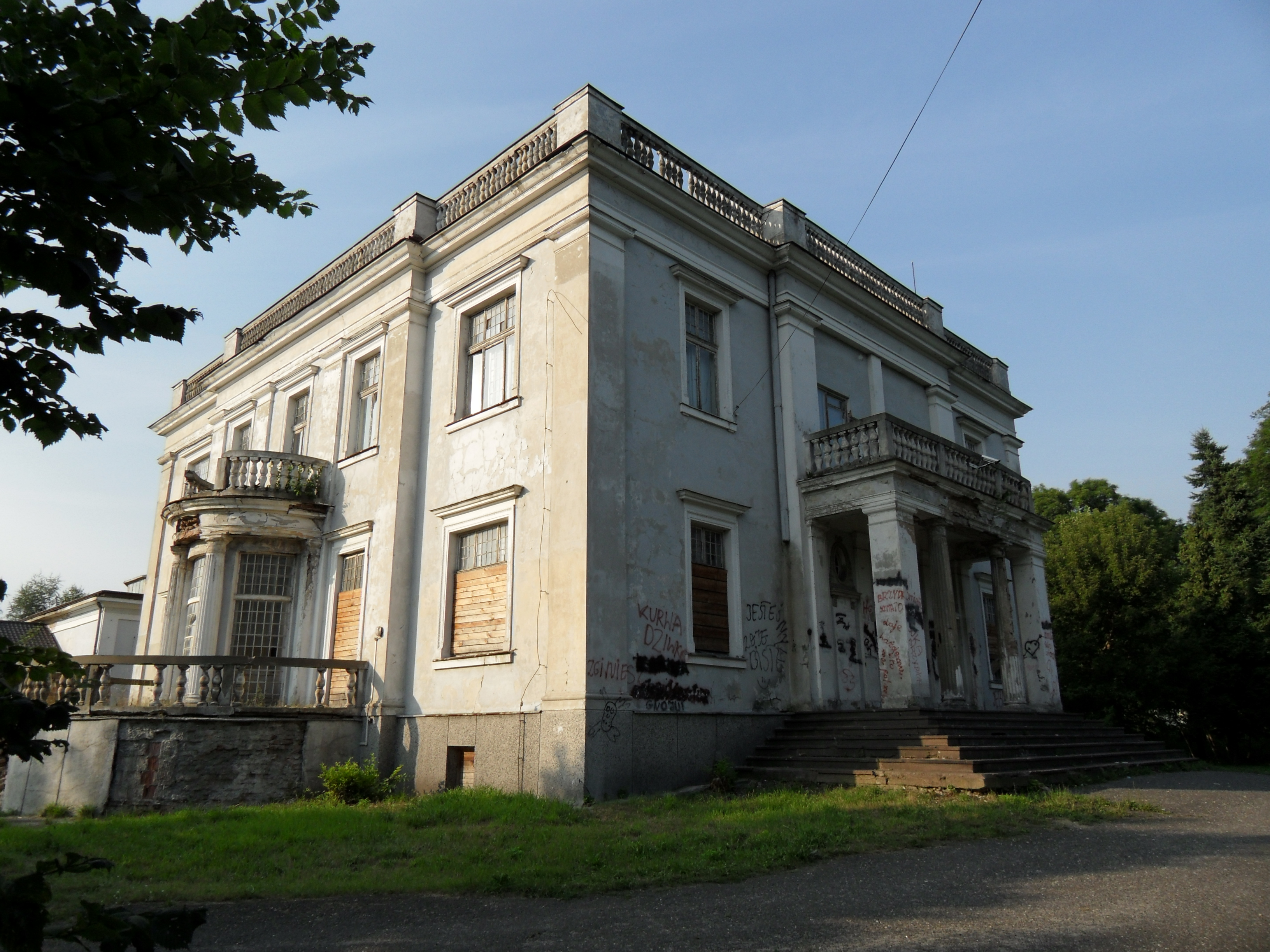 Pałac Wierusz-Kowalskich w Brwinowie